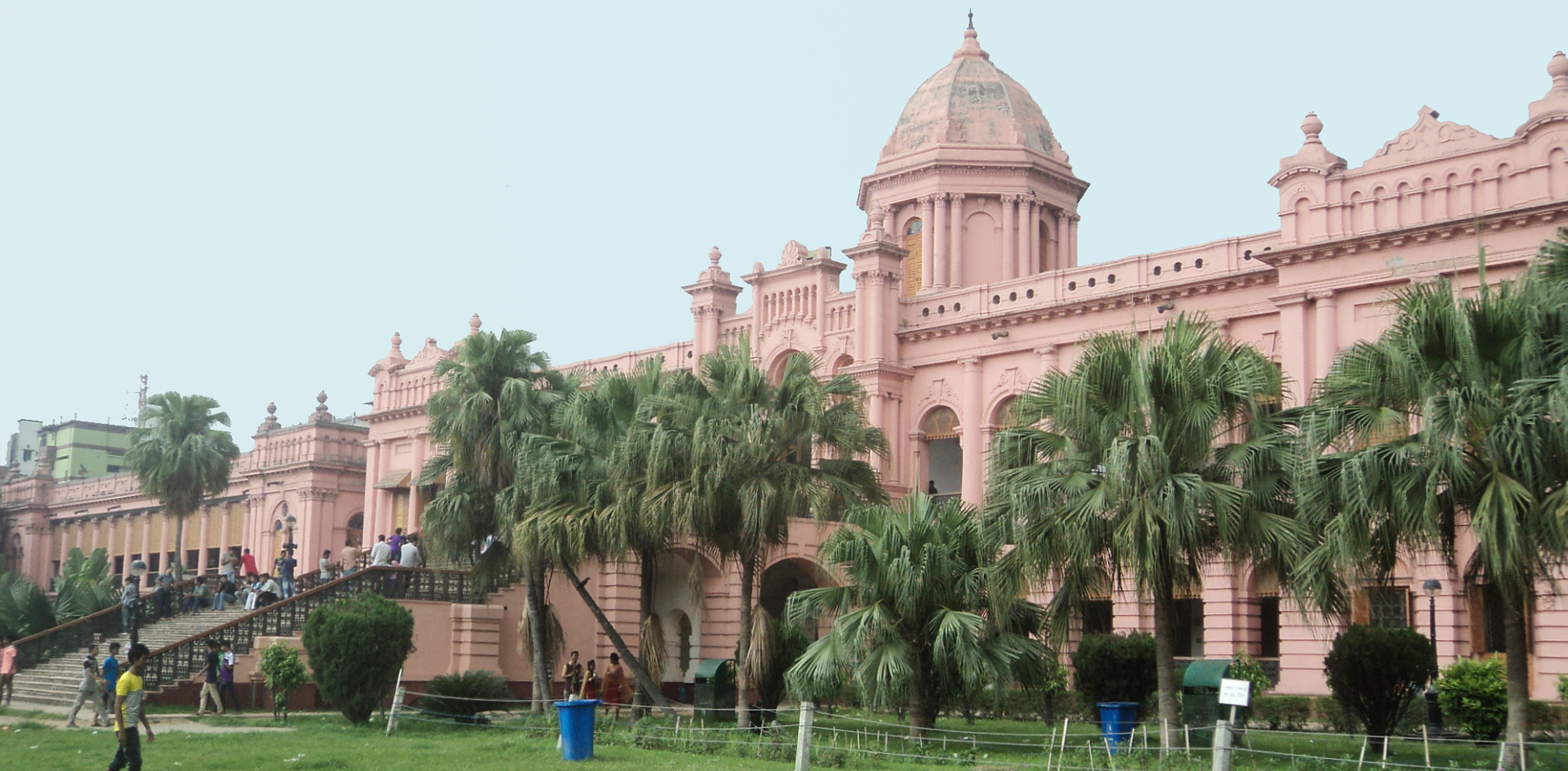 আহসান মঞ্জিল